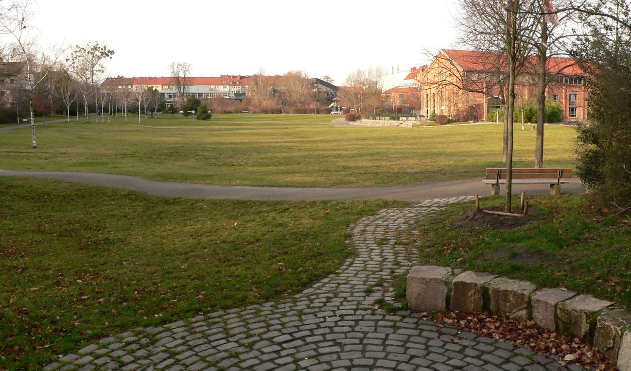 Vahrenwalder Park heute auf dem Gelände des Militärreitinstitut Hannover